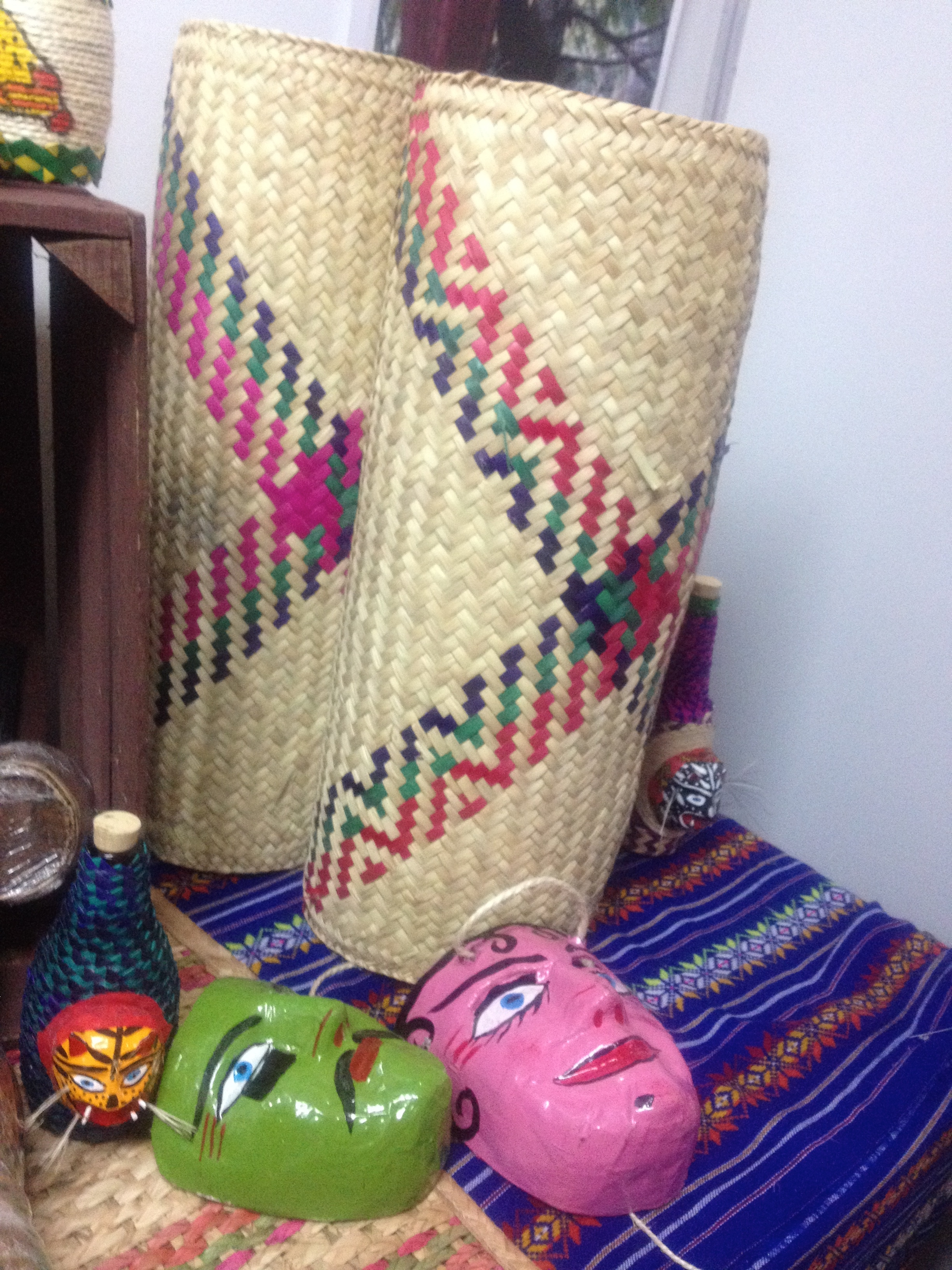 Petate de palma y máscaras artesanales hechas de cartón del estado mexicano de Guerrero